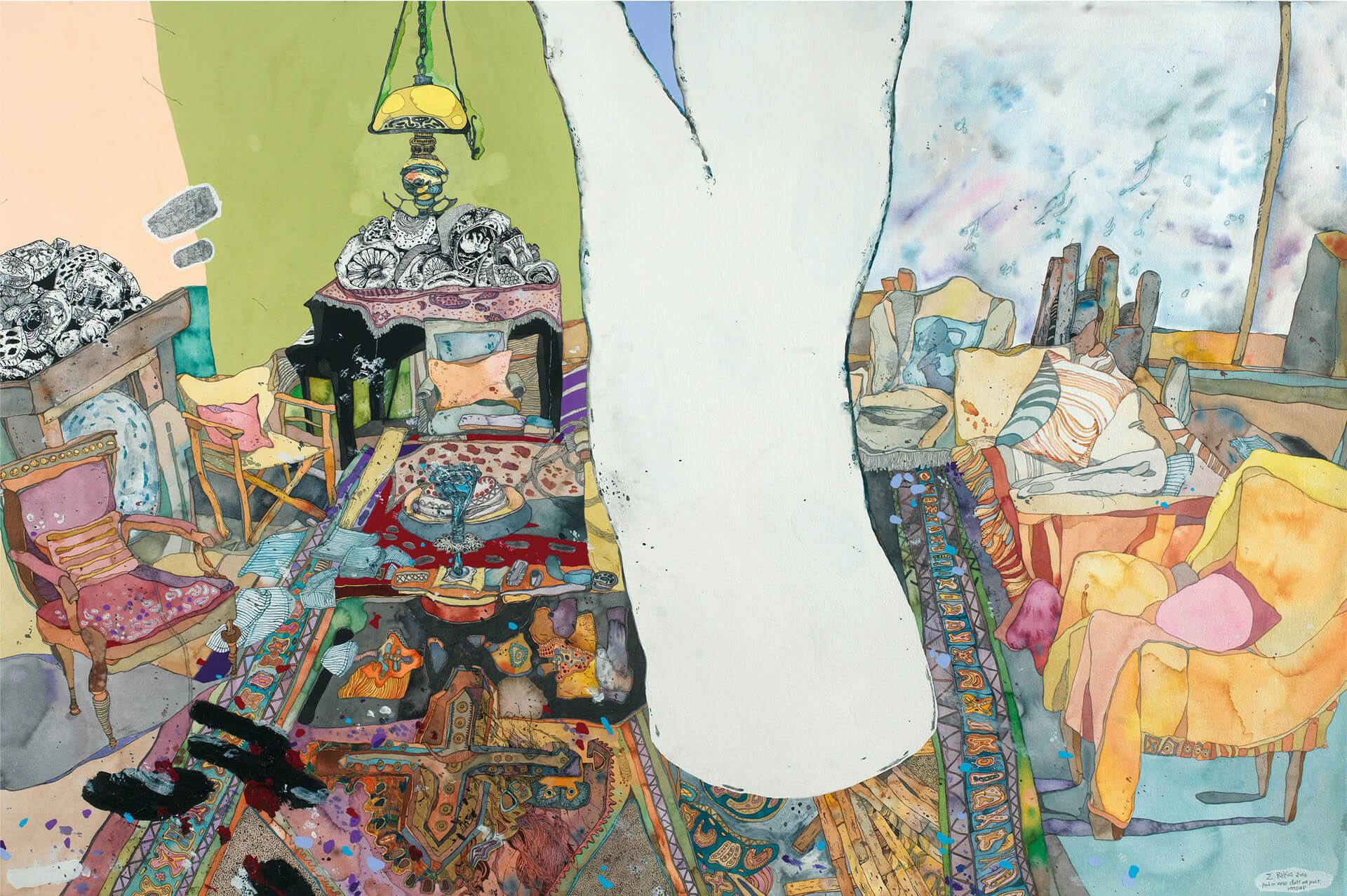 No More Shall We Part, mixed media